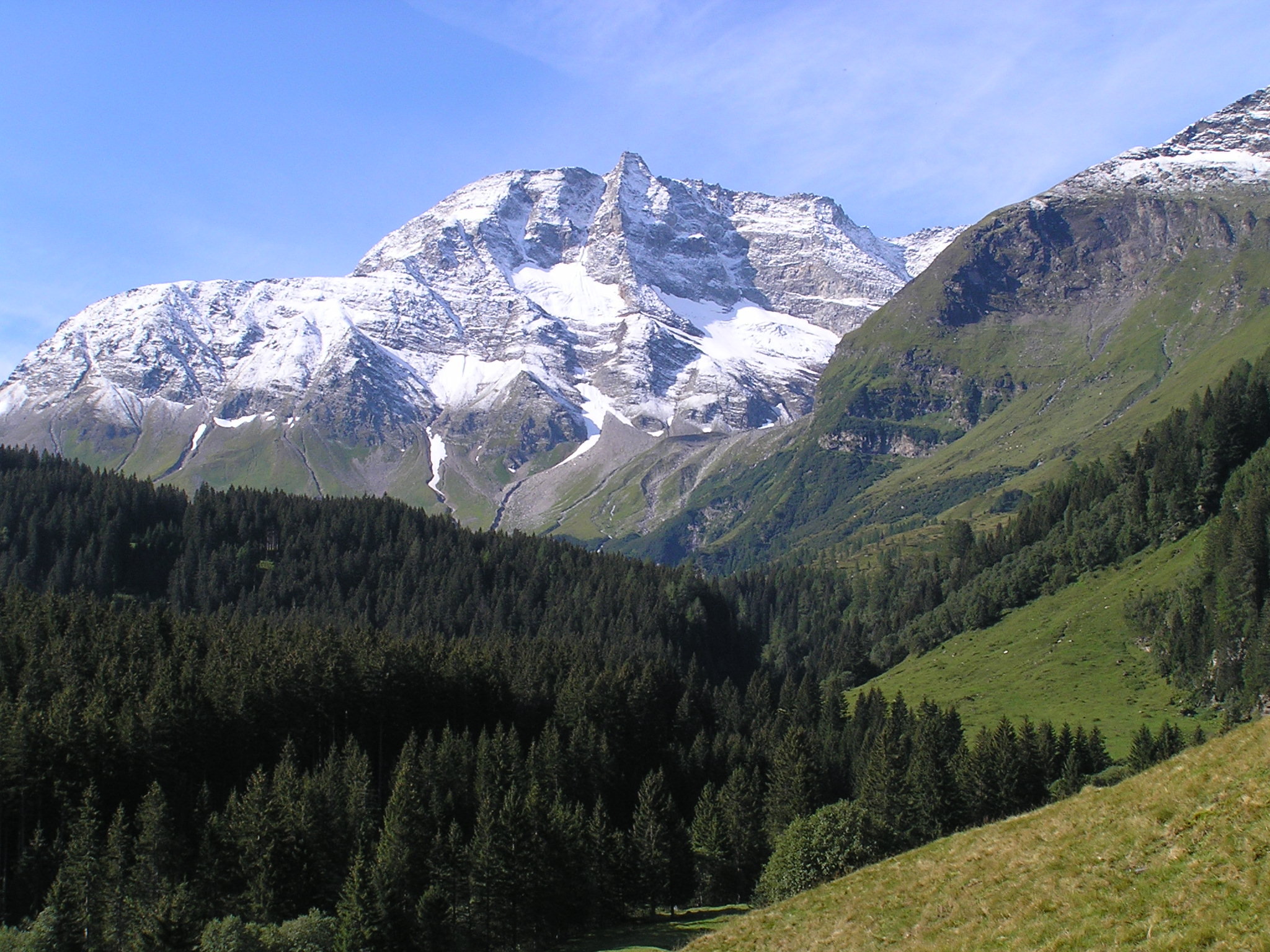 Der Hohe Sonnblick von Norden